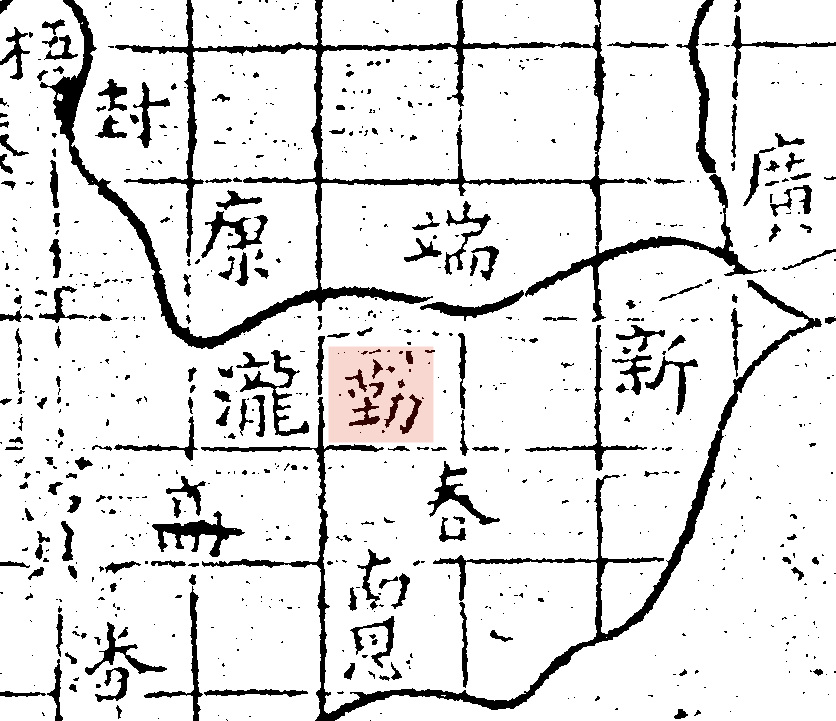 粵語: 禹跡圖中嘅勤州